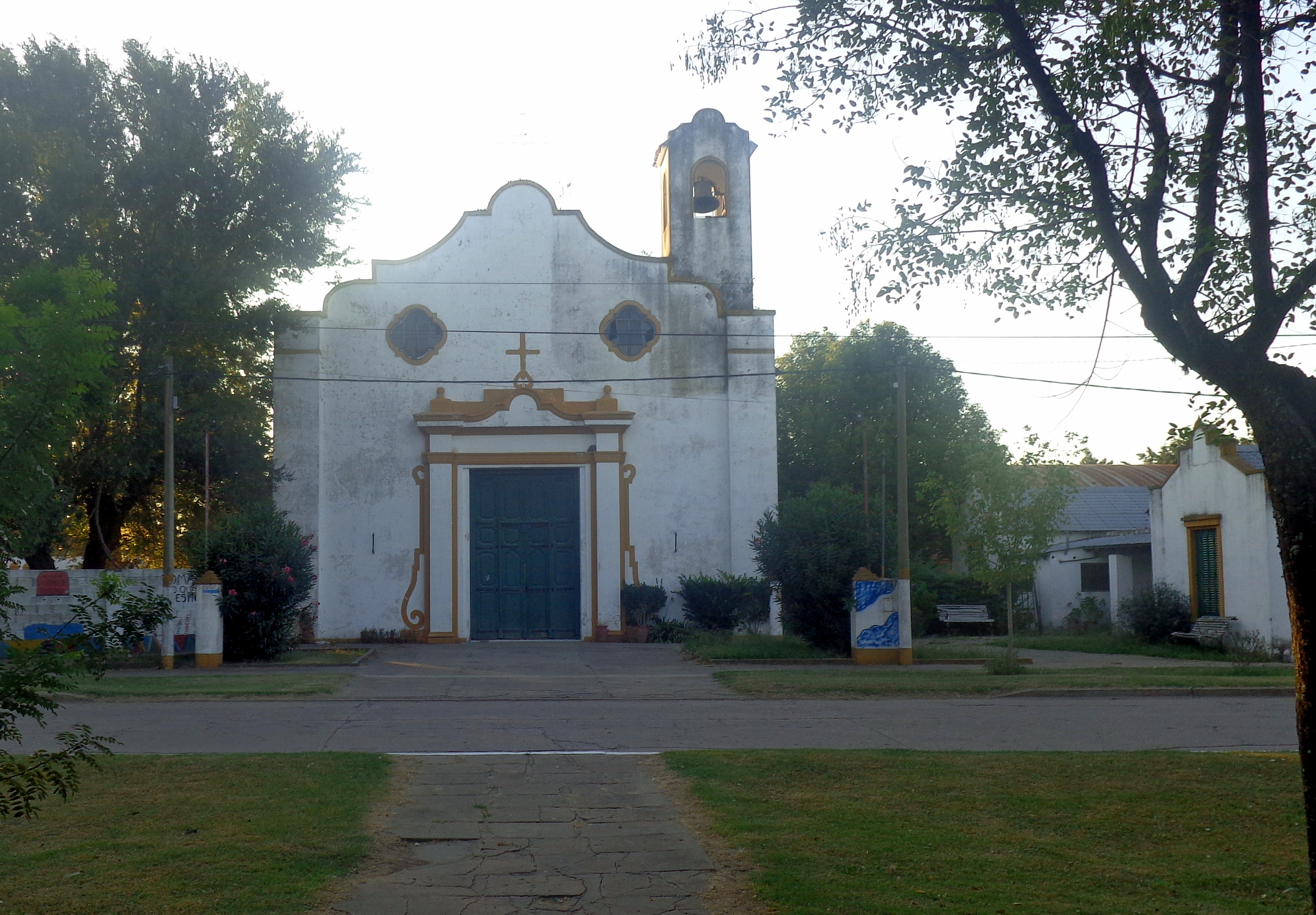 Iglesia en Santa Lucía, San Pedro, Buenos Aires, Argentina.